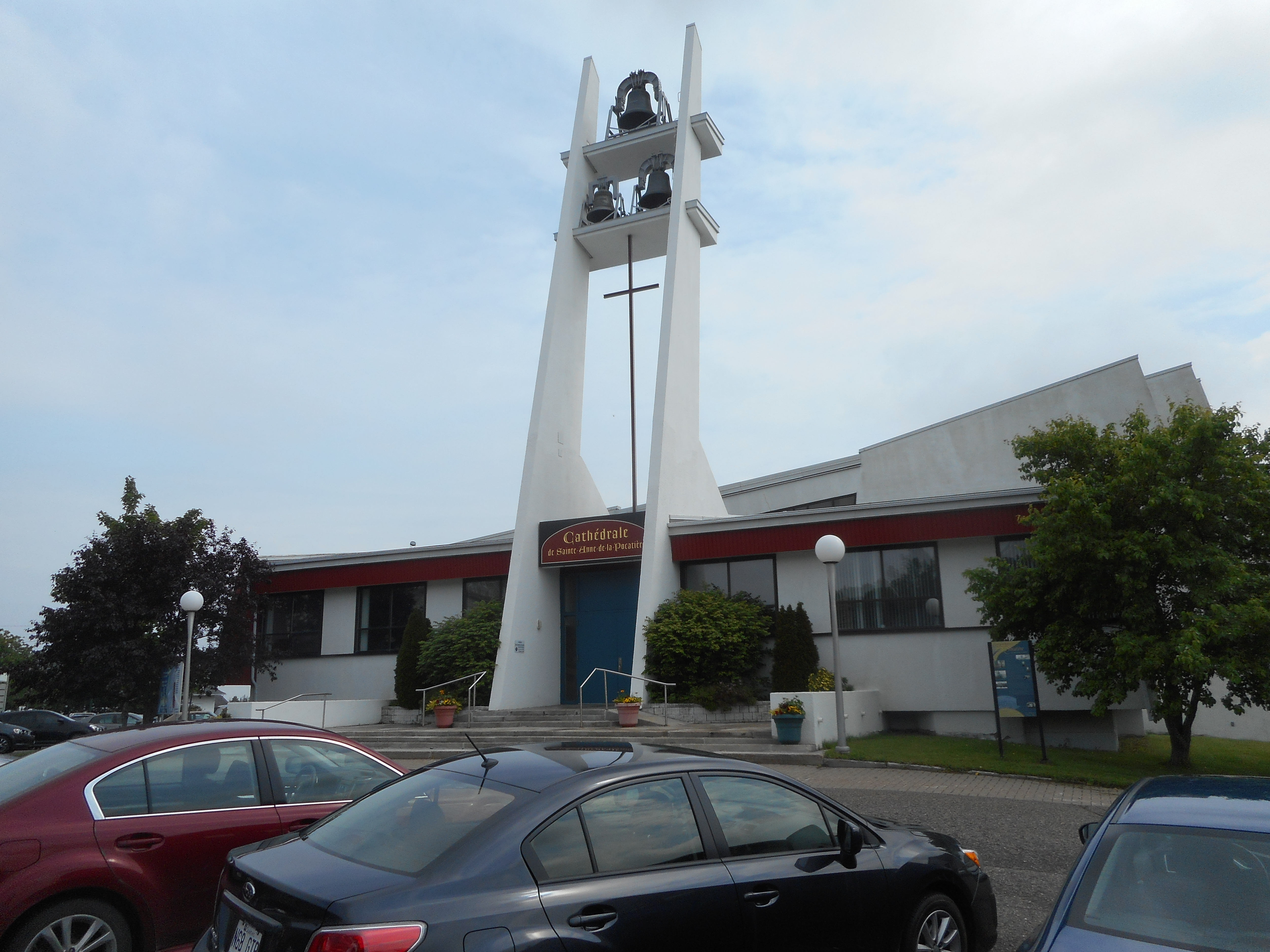 La cathédrale de Sainte-Anne-de-la-Pocatière, siège du diocèse catholique de La Pocatière au Québec.